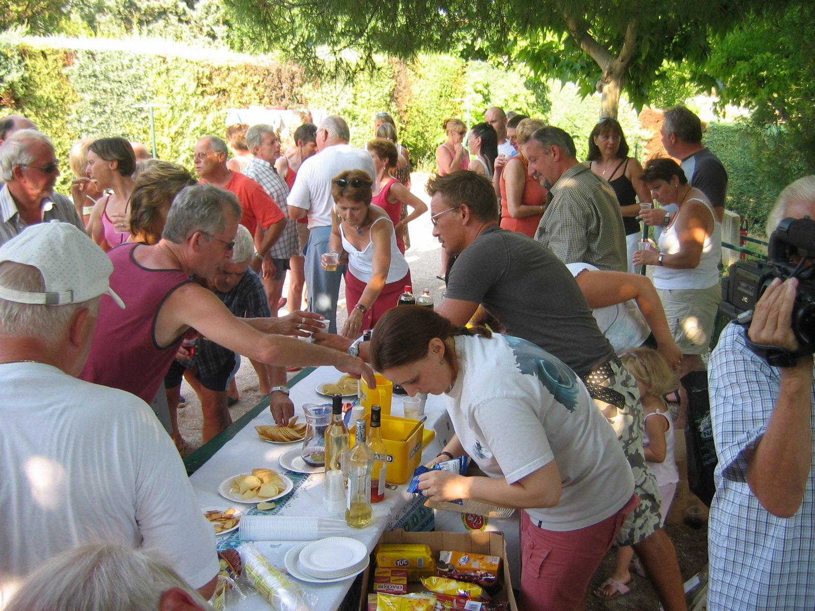 Apéritif de bienvenue aux estivants